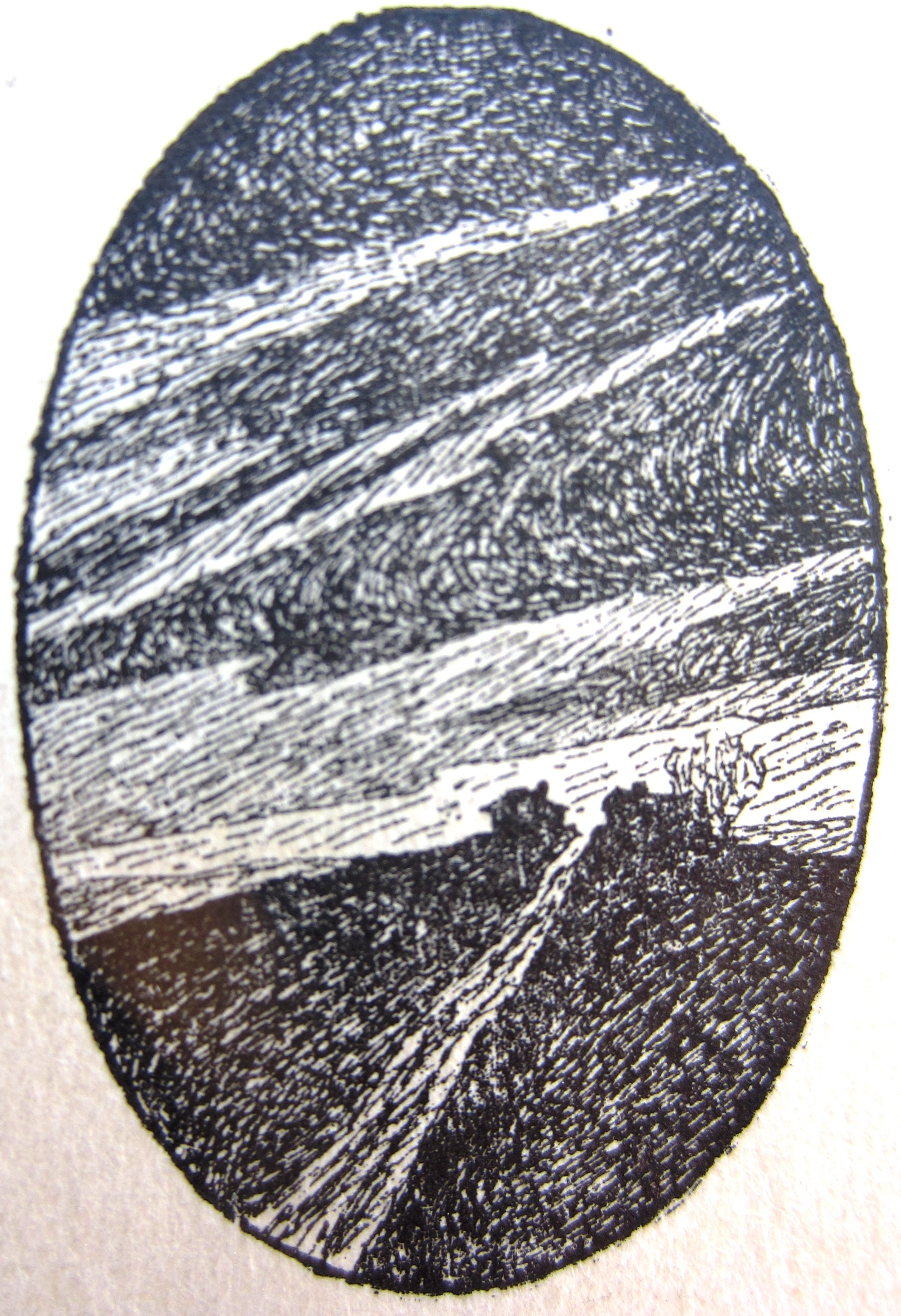 Vinjett från 1907 till Hjalmar Söderbergs novellsamling "Det mörknar öfver vägen".